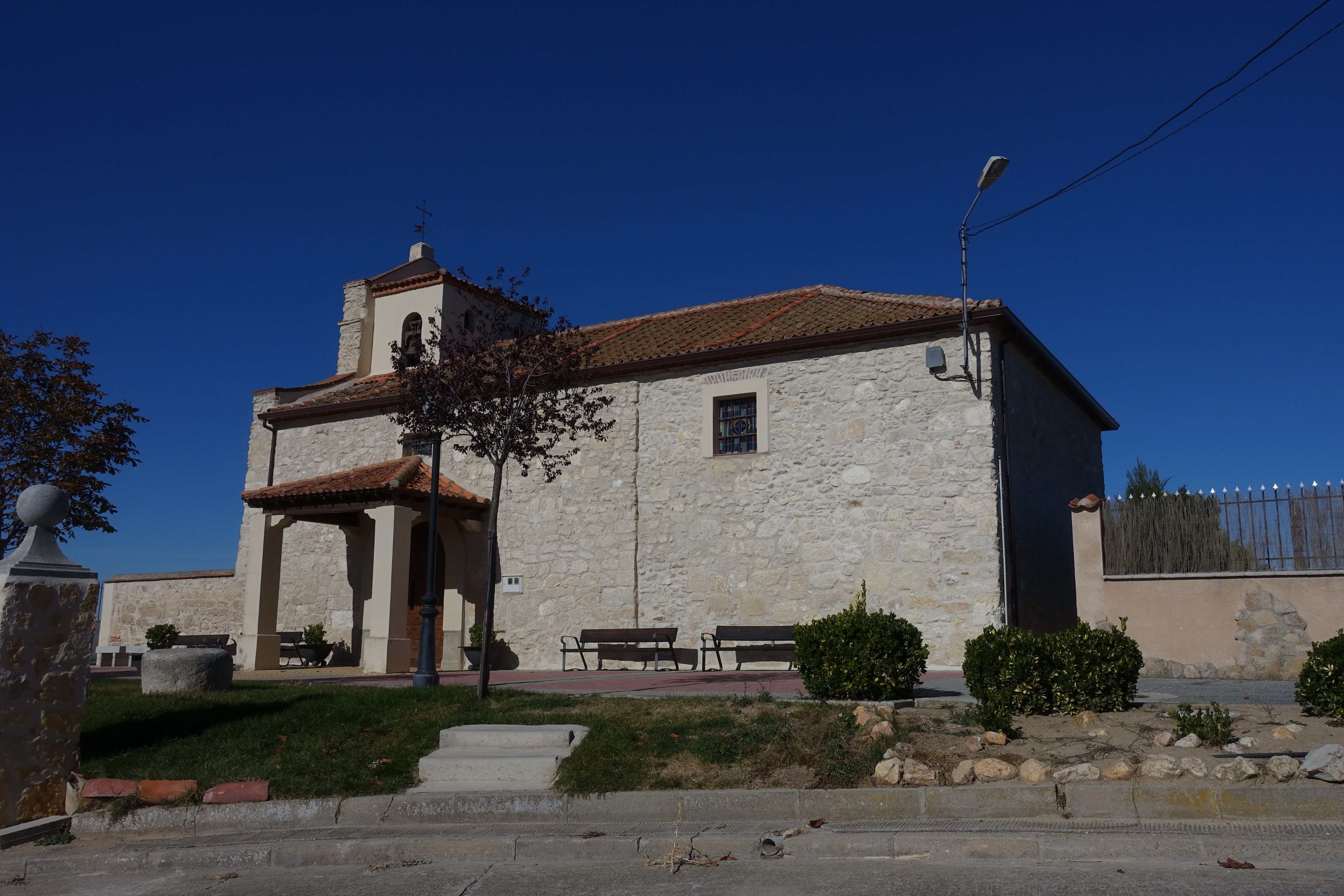 Iglesia de San Bartolomé, Juarros de Riomoros (Segovia, España).